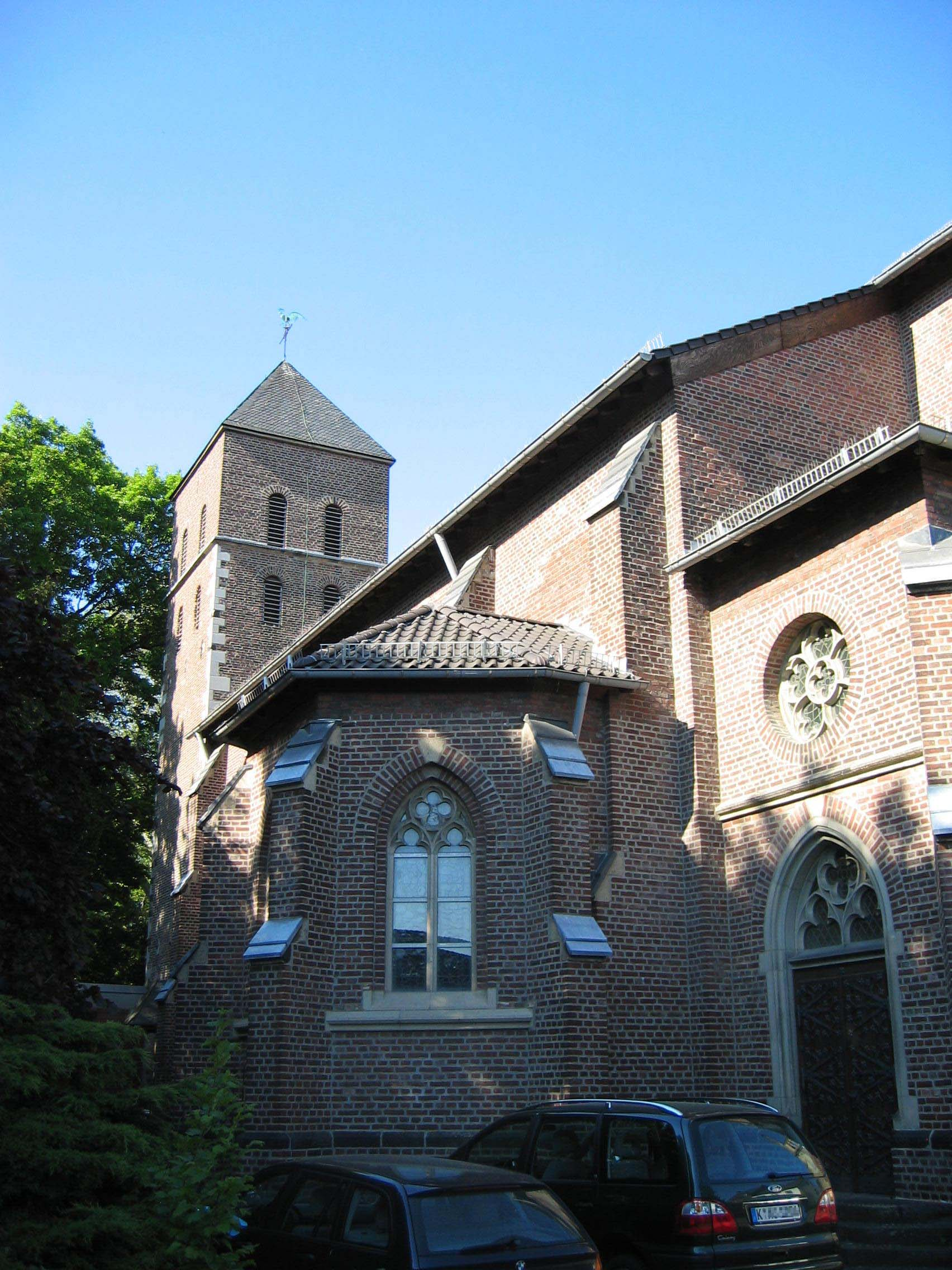 St. Mariä Geburt, Köln-Stammheim